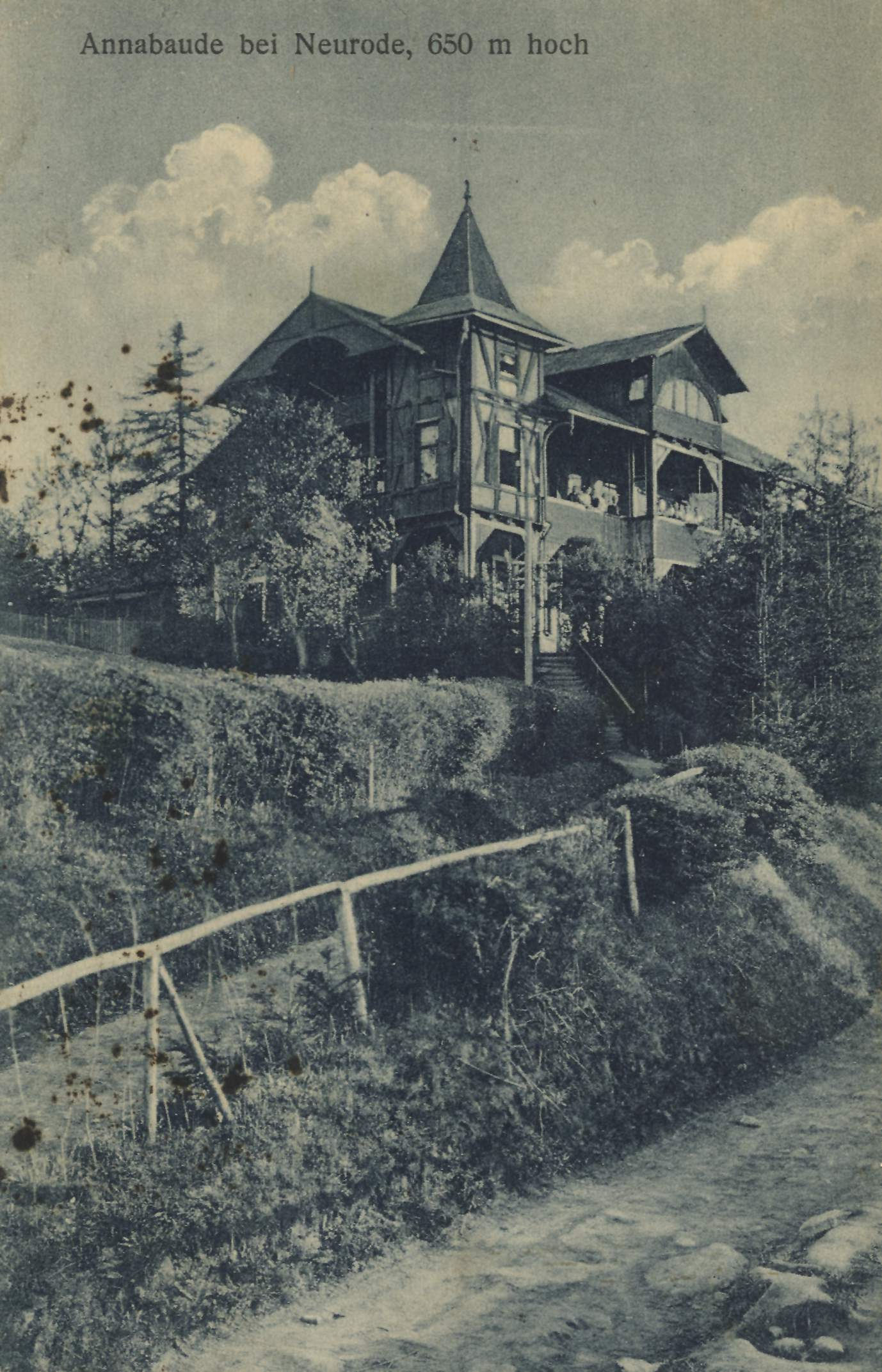 Annabaude bei Neurode